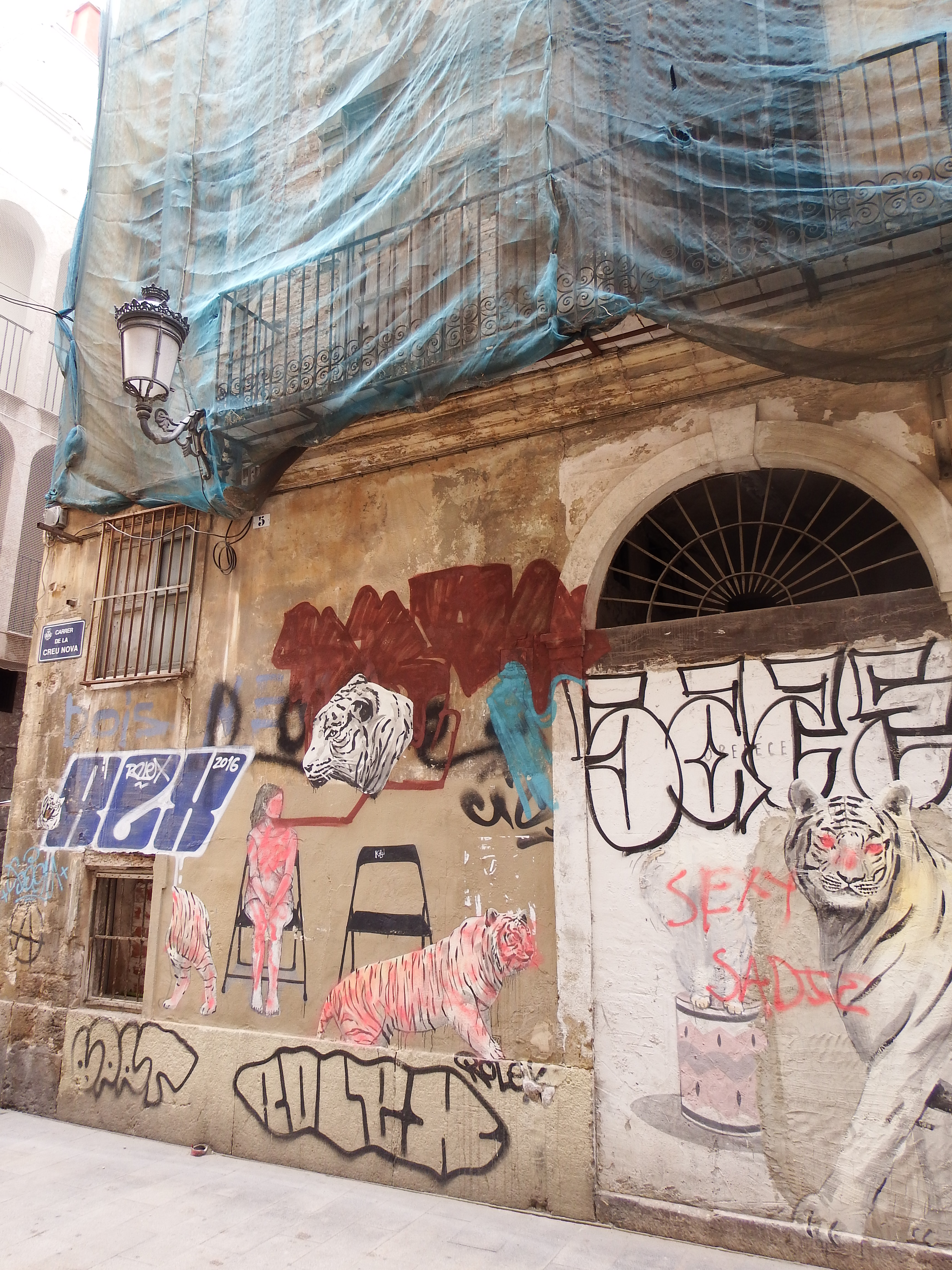 Casa de la Calle Creu Nova donde nació Alejandra Soler Gilabert, en Valencia